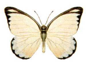 Appias ada caria